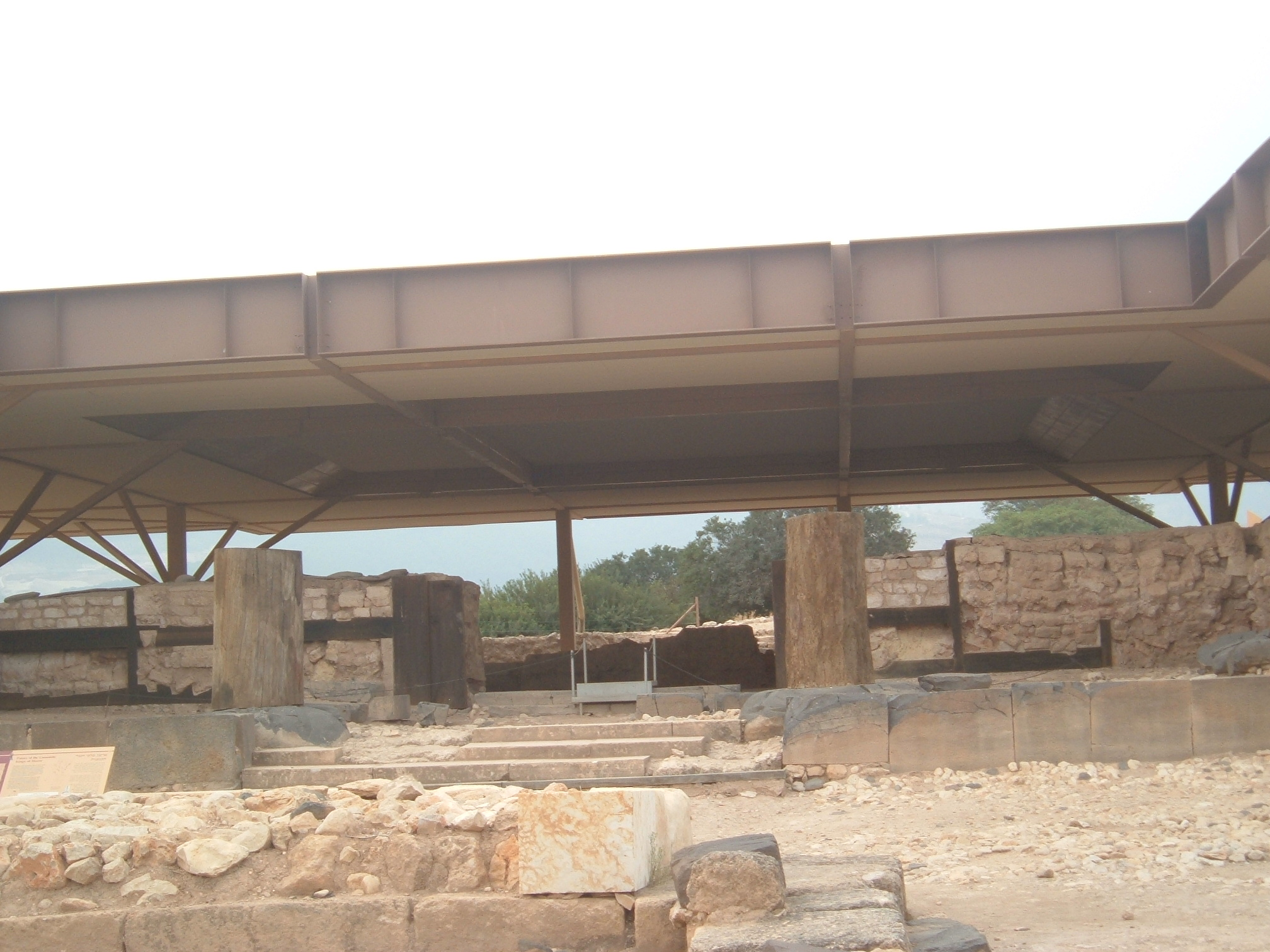 reconstructed canaanite king's palace in ancient Hatzor. ארמון המלך הכנעני המשוחזר בתל חצור